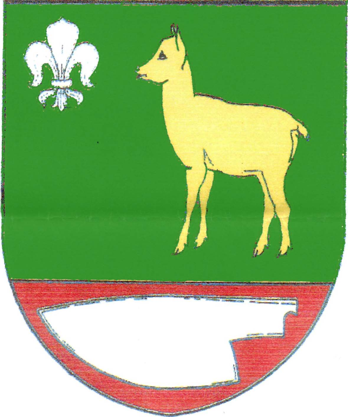 Znak obce Řikonín